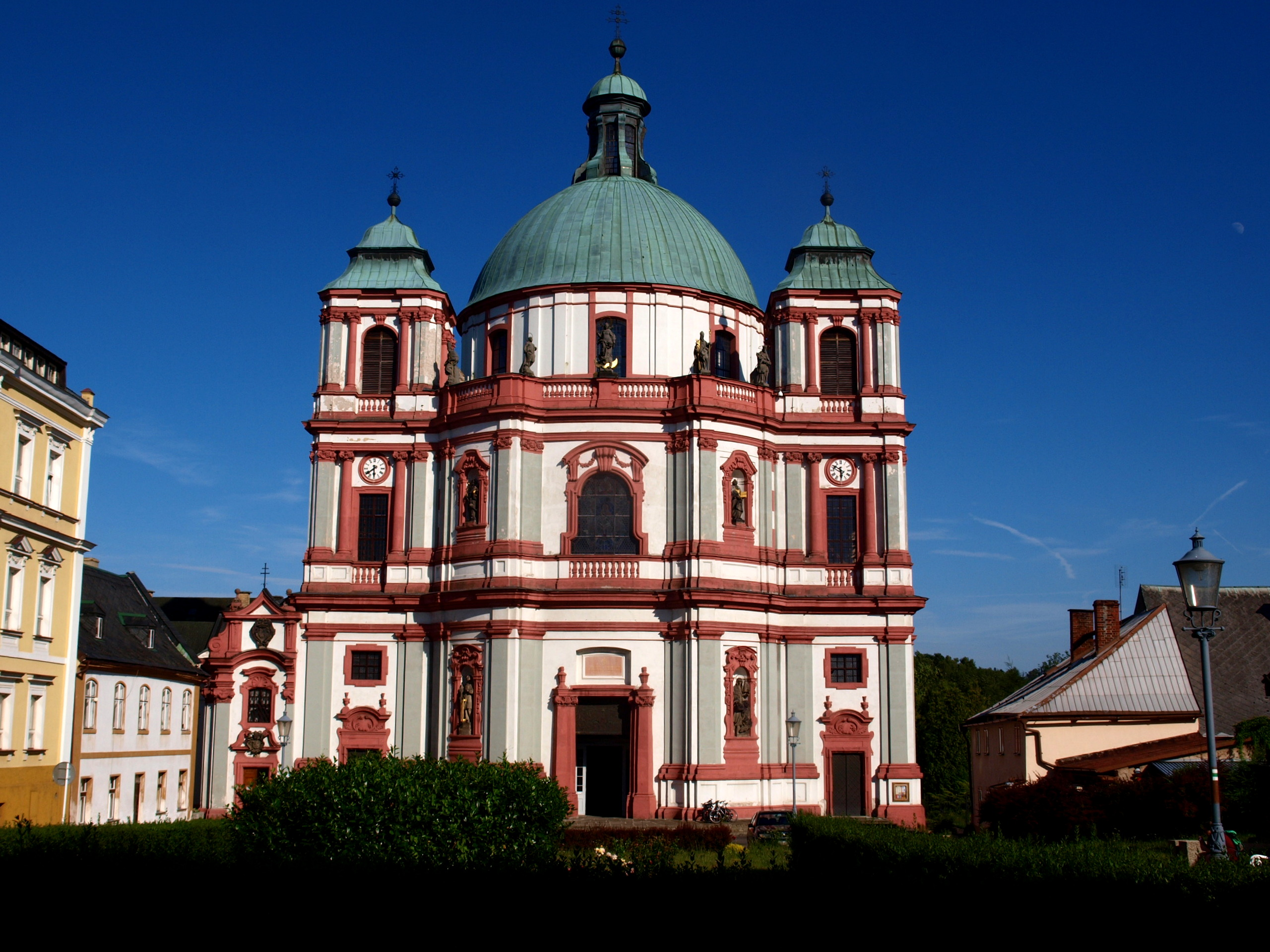 Basilica minor - Kostel sv. Vavřince a sv. Zdislavy v Jablonném v Podještědí